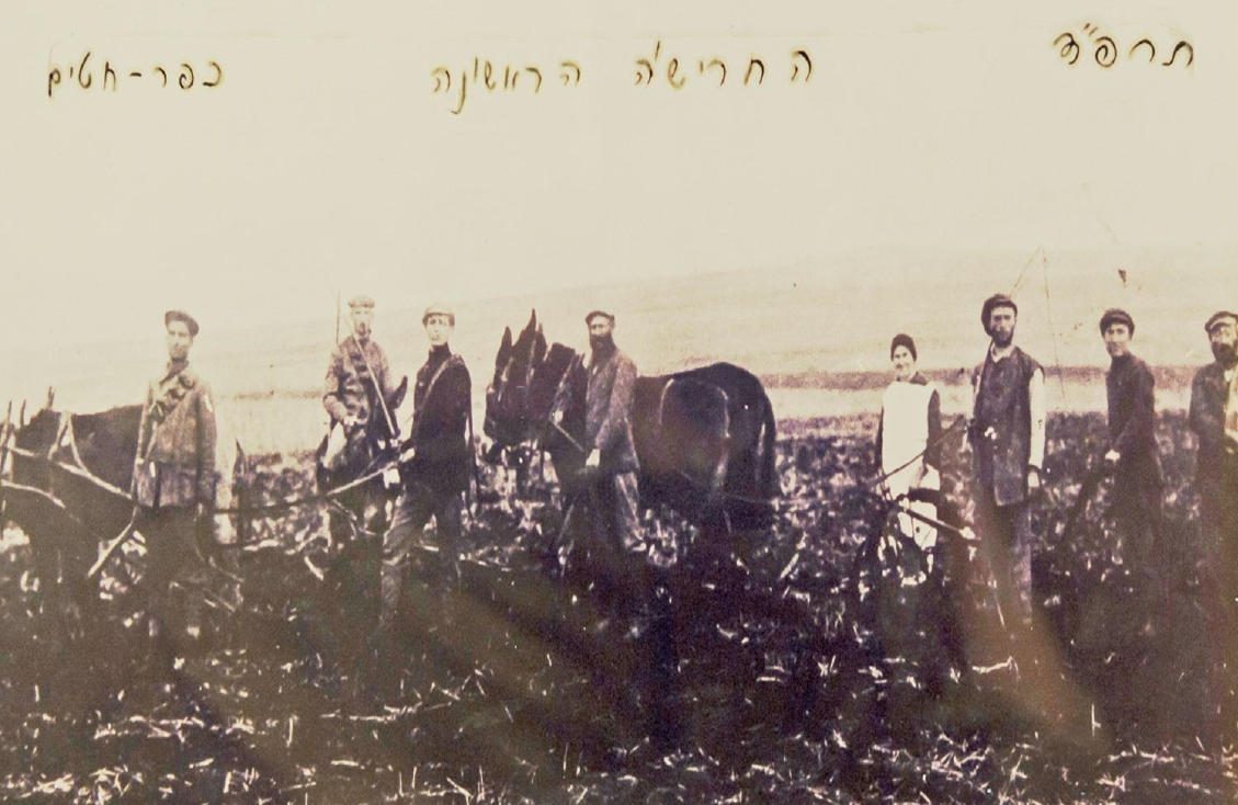 החריש הראשון בעלייה לכפר חיטים, 1924